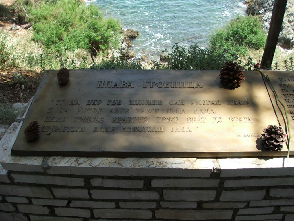 Спомен плоча са стиховима Милитина Бојића крај српског маузолеја на острву Видо. Игор Ирић